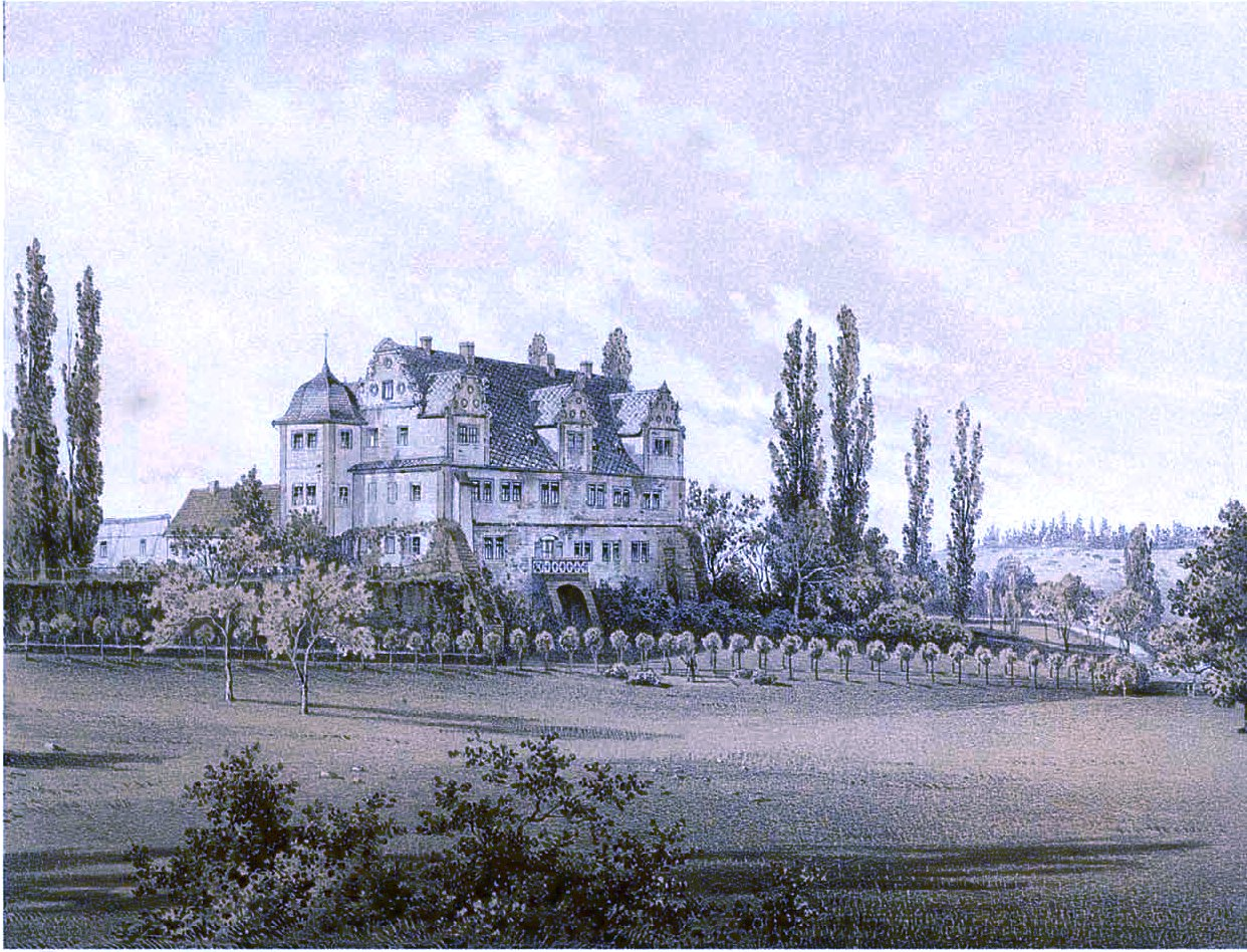 Schloss Wernburg, Lithographie von Alexander Duncker, 1869